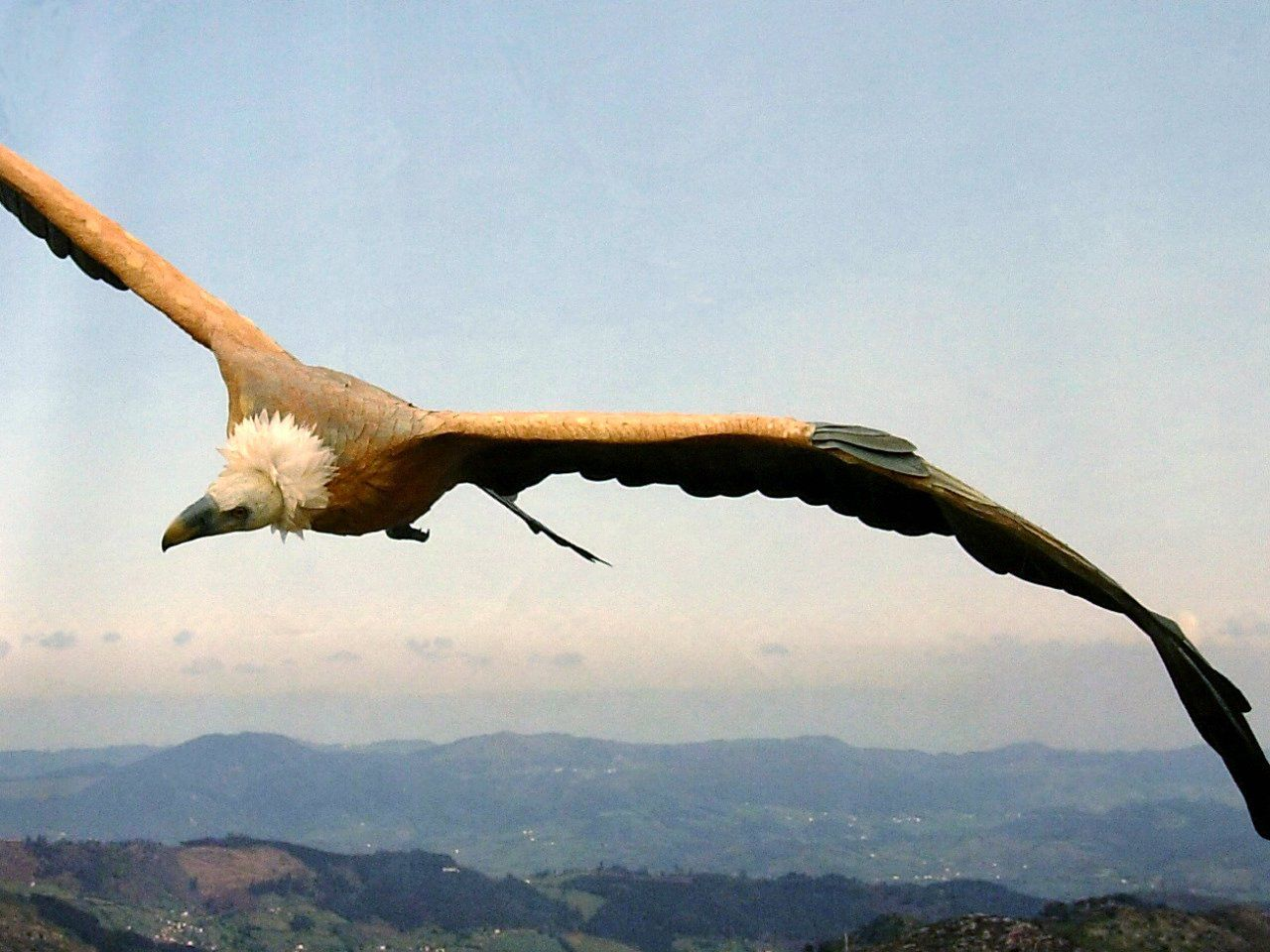 Pue afayase-y nos Picos d'Europa Castellano: Se le puede encontrar en los Picos de Europa.